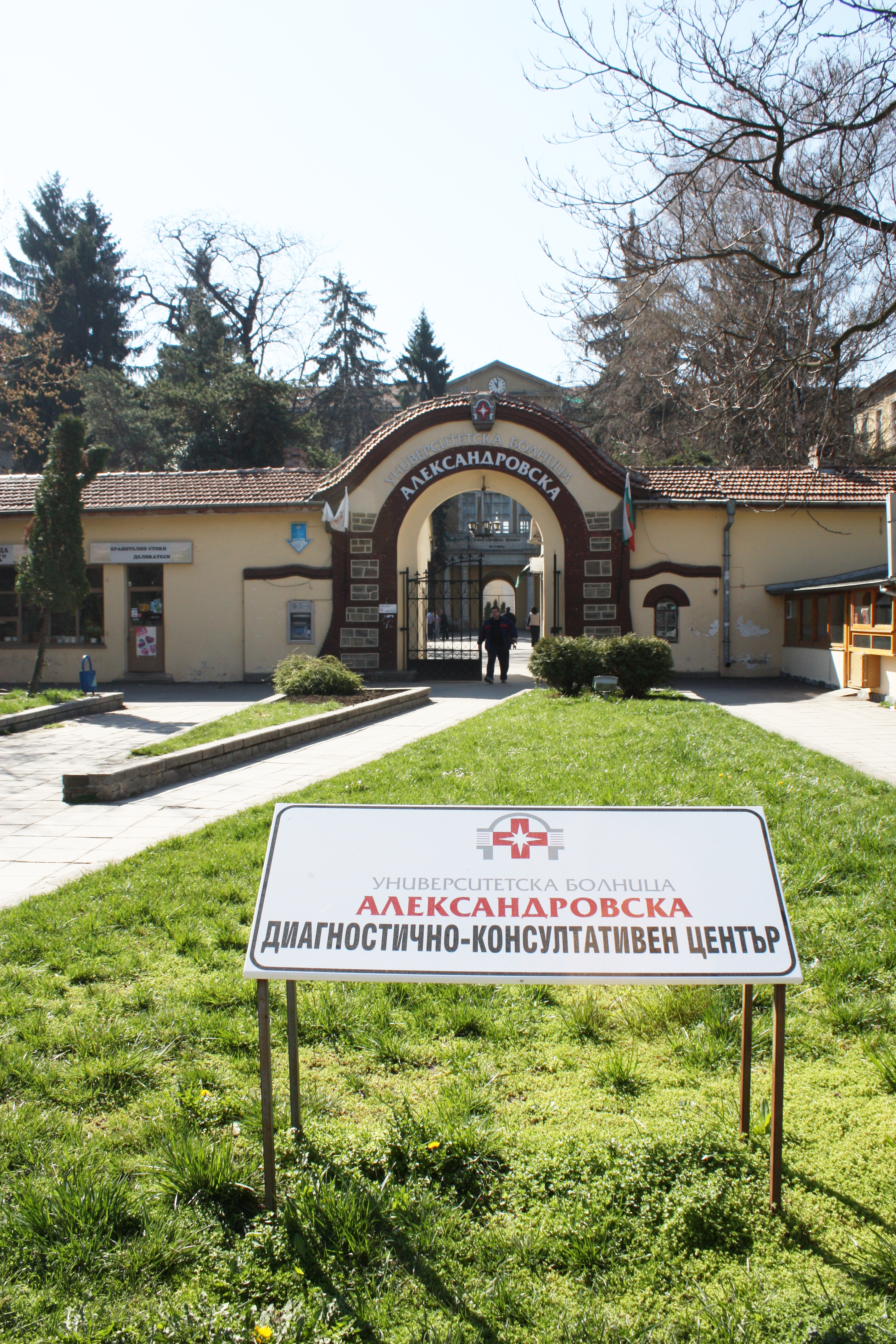 Sofia Medical University, Sofia, Bulgaria, Medizinische Universität Sofia, ehemals: Medizi8nische Akademie Sofia; Медицински университет - София